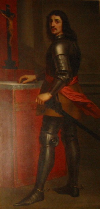 Le comte Guillaume le Grand de Bourgogne - Peinture de la cathédrale St Jean de Besançon